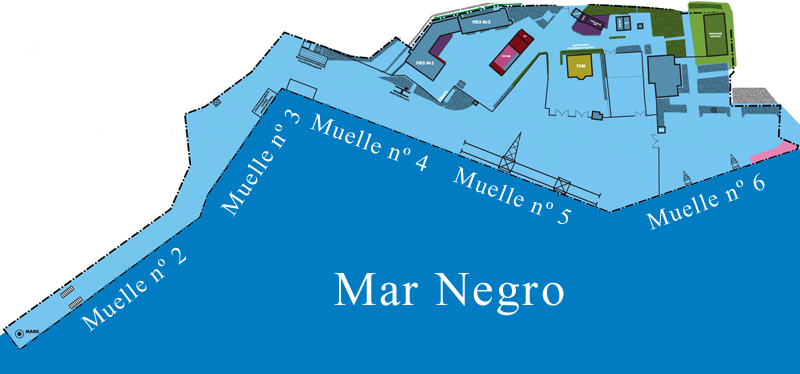 Puerto de Eupatoria situado en Crimea, es este diagrama muestra los amarres de los que consta el puerto.